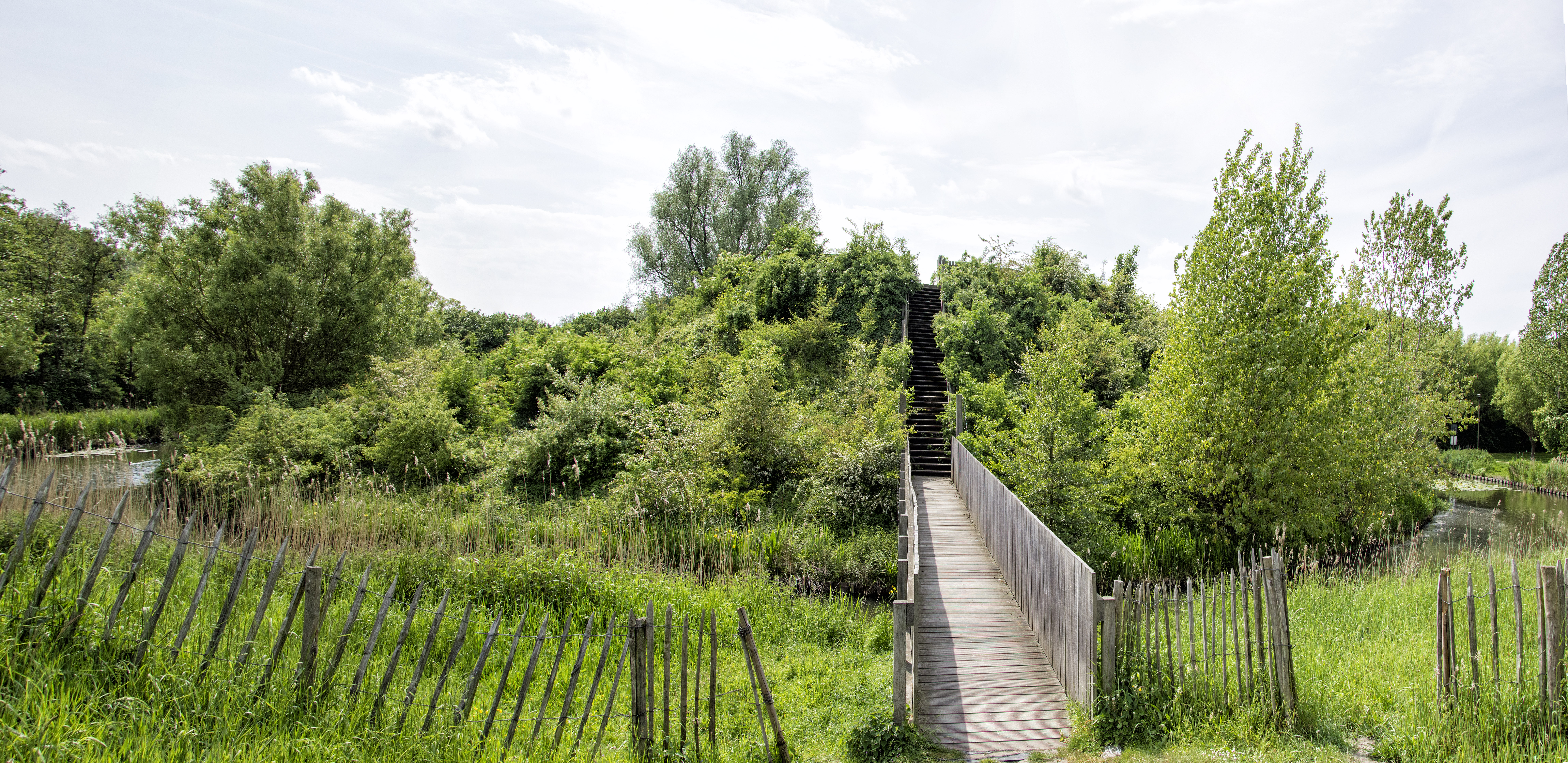 Het mottekasteel Hoge Wal te Ertvelde, België